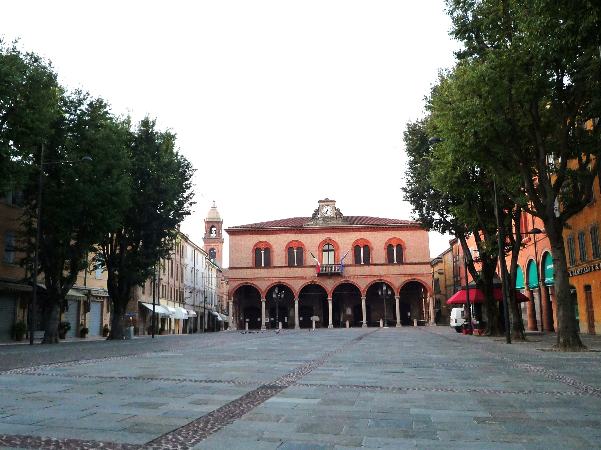 Mirandola-1